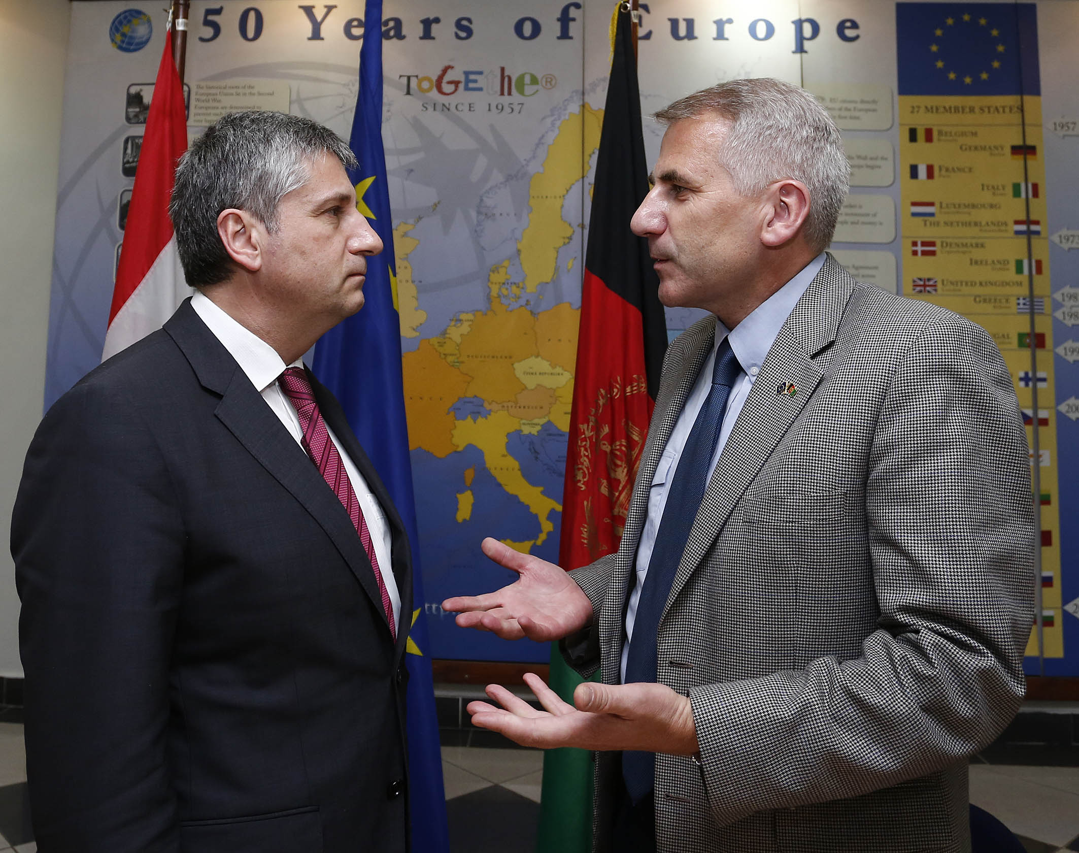 Arbeitsbesuch von Aussenminister Michael Spindelegger in Afghanistan. Spindelegger im Gespräch mit EU Botschafter Usackas. 15.02.2013, Foto: Dragan Tatic